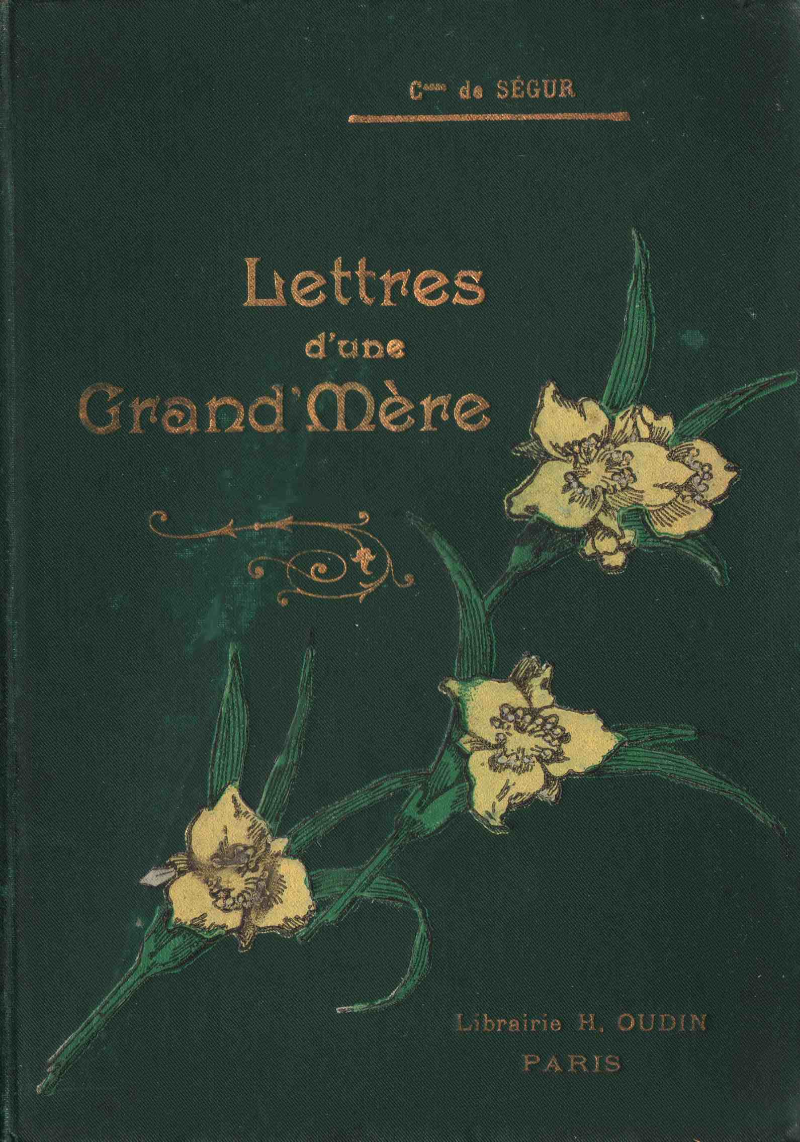 Couverture du livre posthume Lettres d'une grand'mère de la comtesse de Ségur